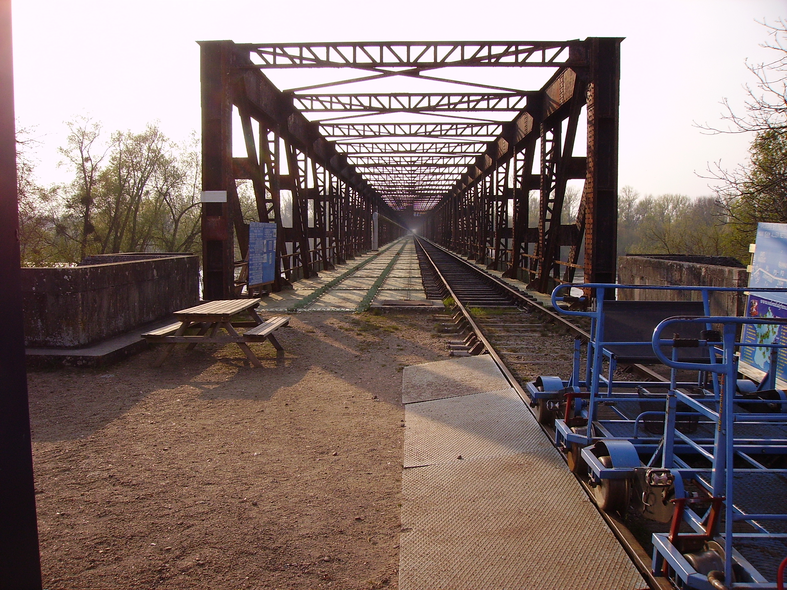 Cyclo-draisines à la « gare de départ » de Port-Aubry, à l'entrée Est du viaduc de Port-Aubry, près de Cosne-Cours-sur-Loire, Nièvre, France.